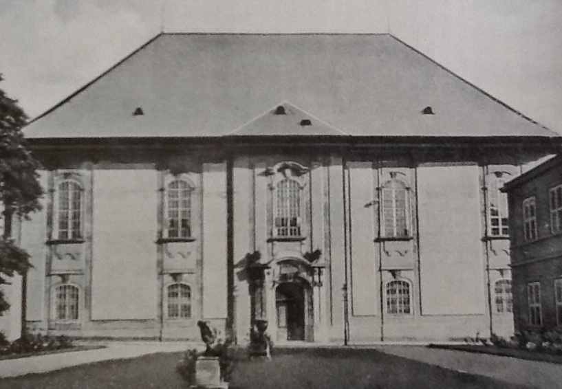 Erbaut im Jahre 1776